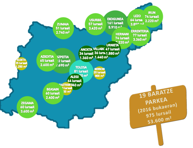 Gipuzkoako Kutxa Ekoguneko Baratza Parke Sarea